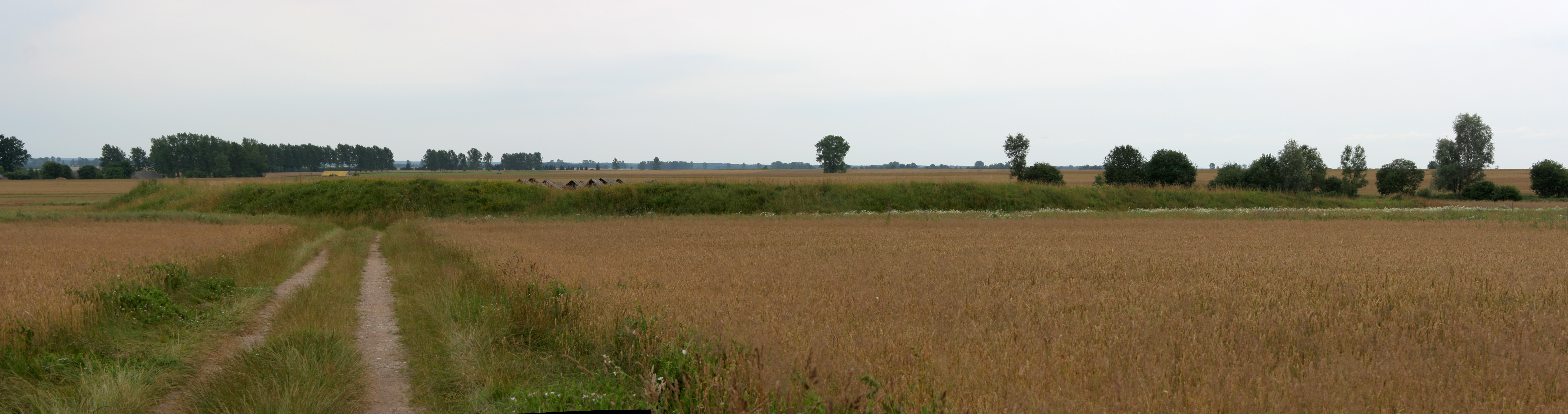 Grodzisko "Okopy" w Zbuczu.